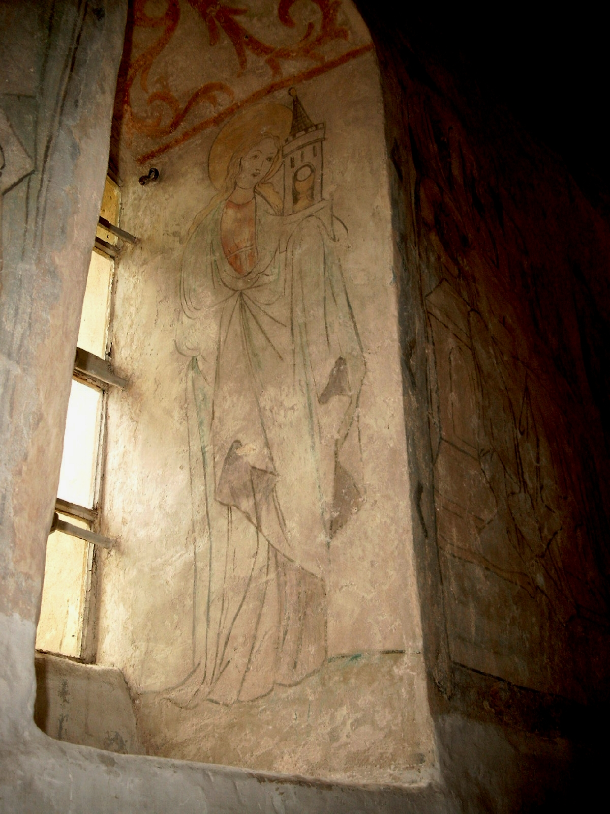 Dorfkirche Görsdorf b. Storkow, Stadt Storkow (Mark), Lkr. Oder-Spree, Brandenburg, Deutschland, Hlg. Barbara (Zustand Juli 2002)